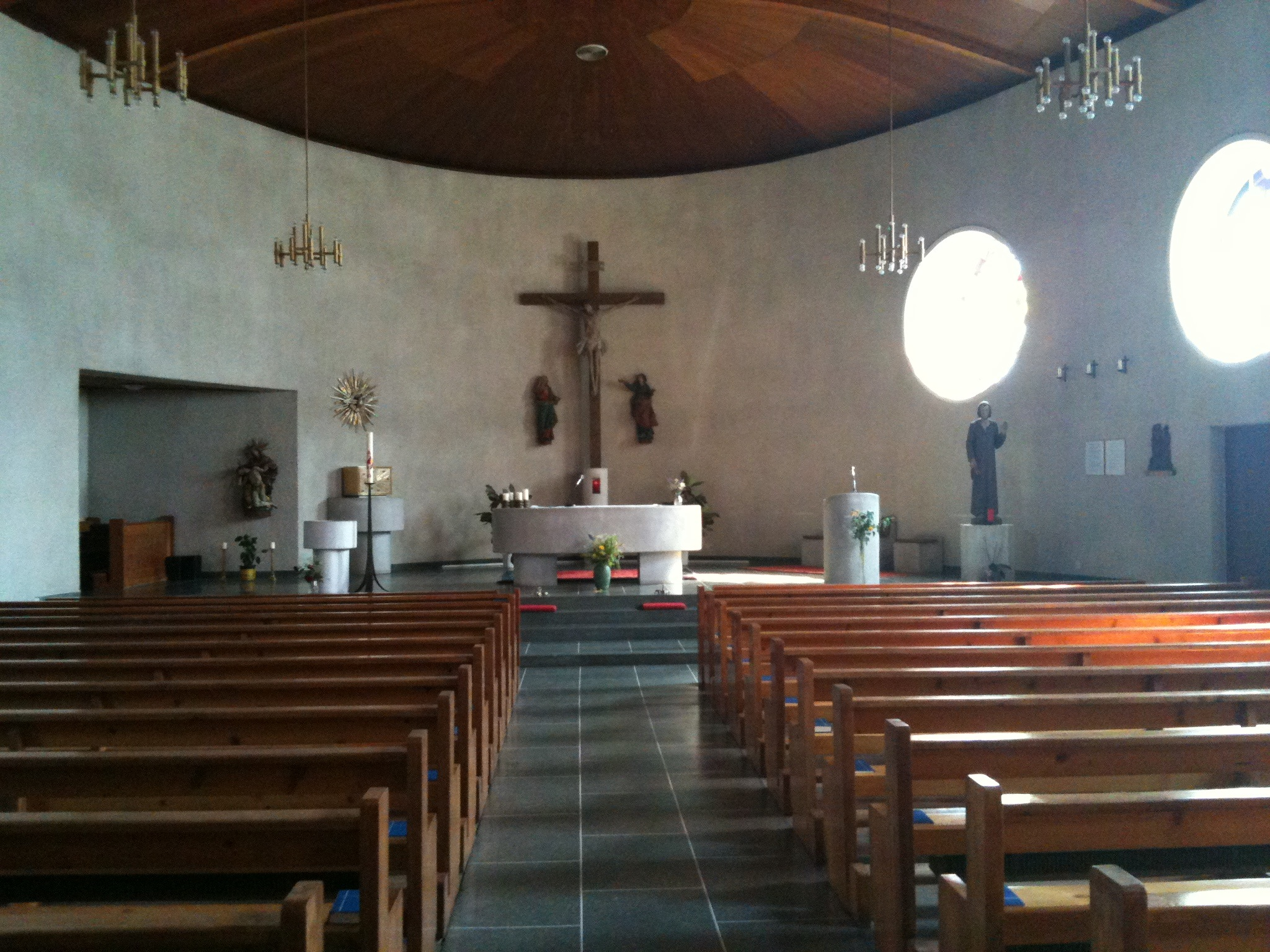 römisch-katholische Pfarrkirche in Albinen, Kanton Wallis